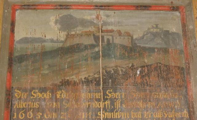 Kirche Gröben, Brandenburg. Bild/Tafel Eingangsflur. - Gedenkbild/Tafel für Gustav Albertus von Schlabrendorf, Schlacht bei der Festung Ofen bei Budapest in Ungarn, 1686.